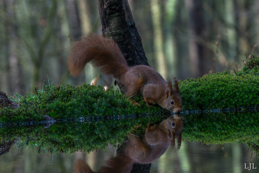 a6--03112.jpg